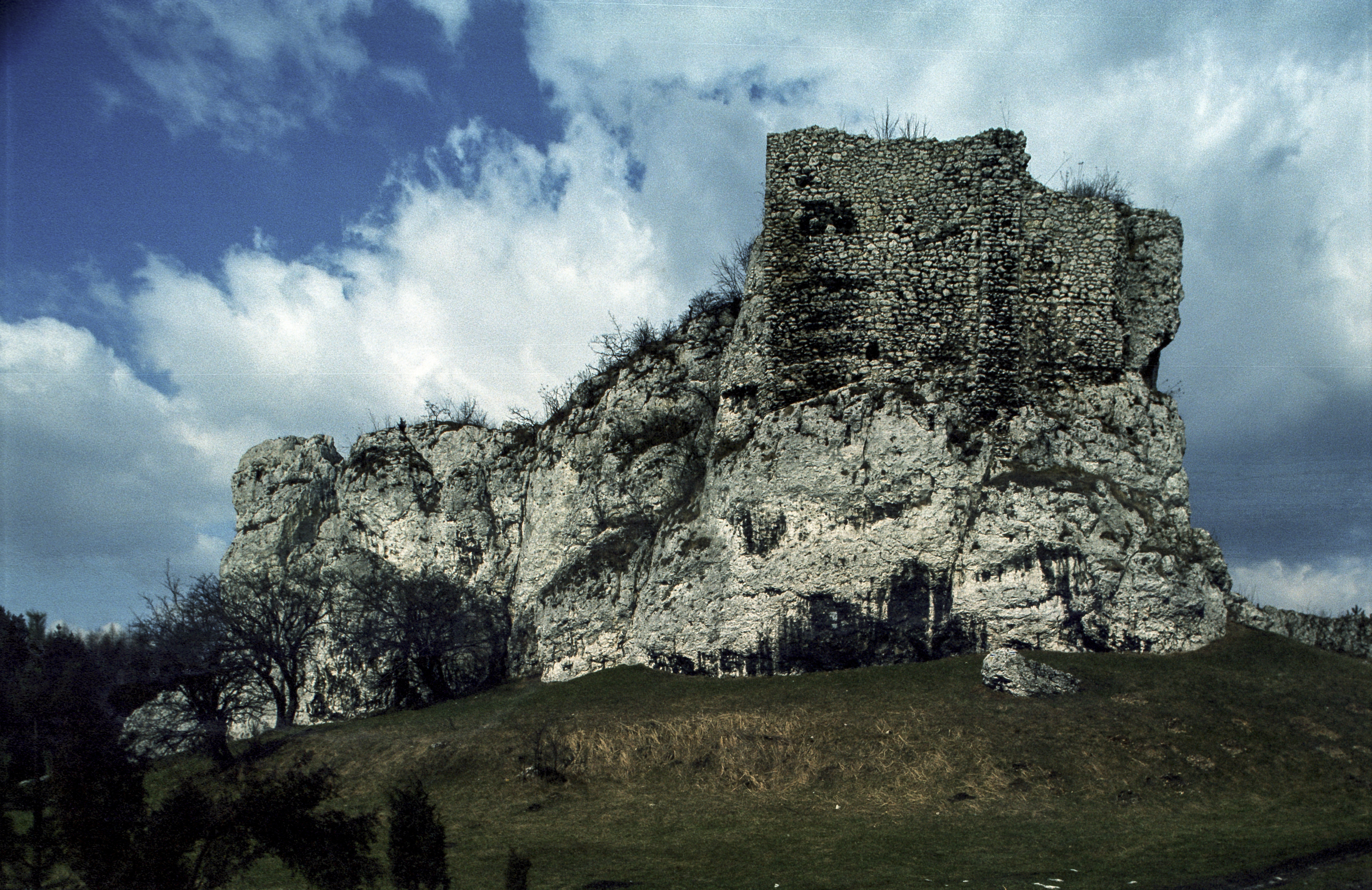 Poland, Jura, Przewodziszowice Castle